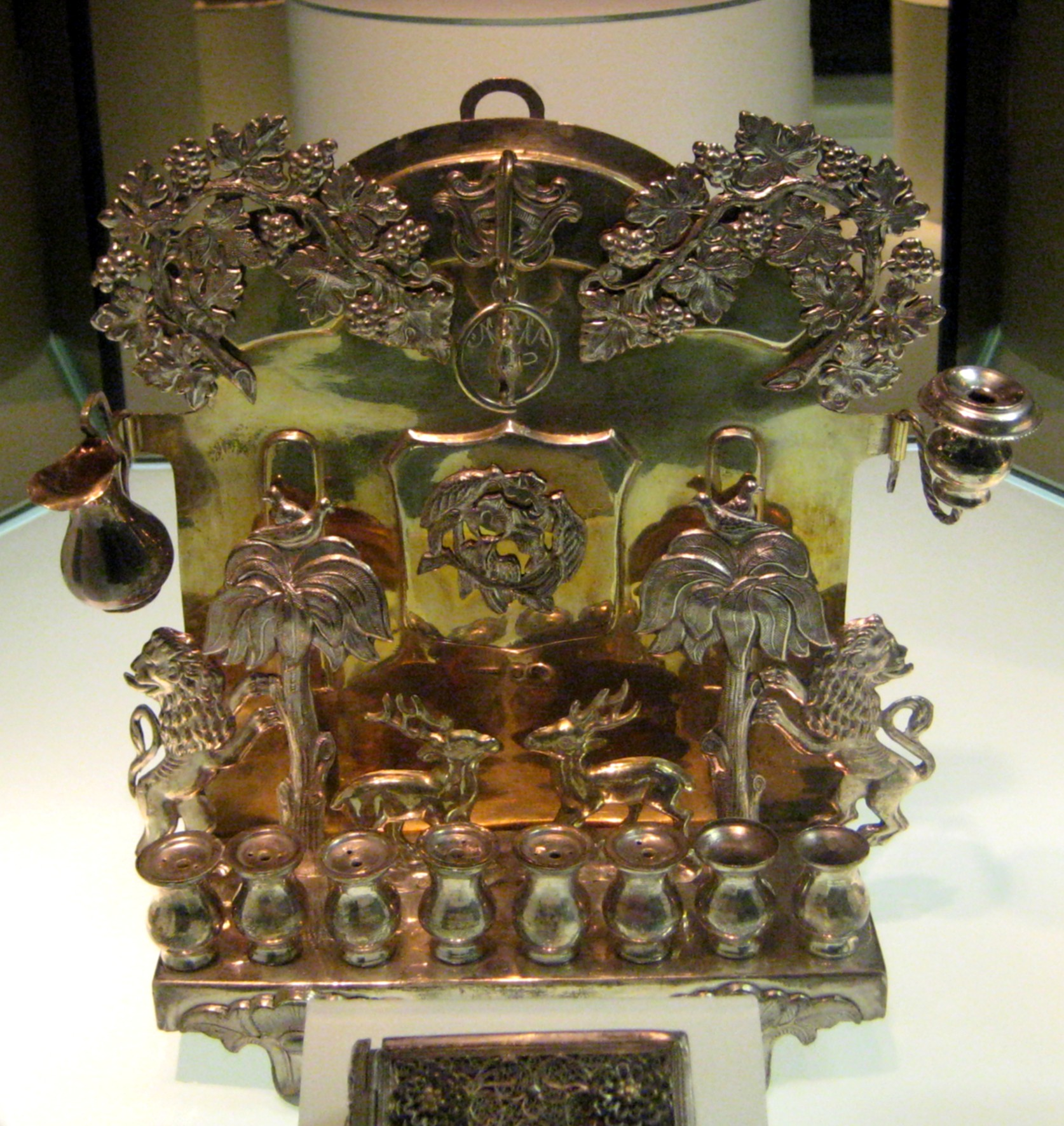 Иудейская религиозная утварь. Ханукальная лампа, Польша, Варшава, 1879. Серебро, позолота, пунцирование. Jewish utensils